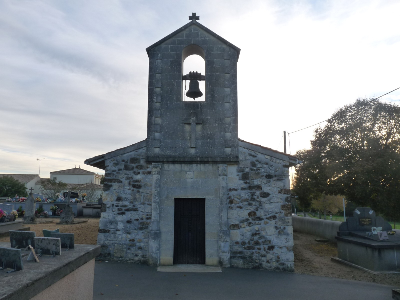 Eglise de Corignac, Charente-Maritime, France